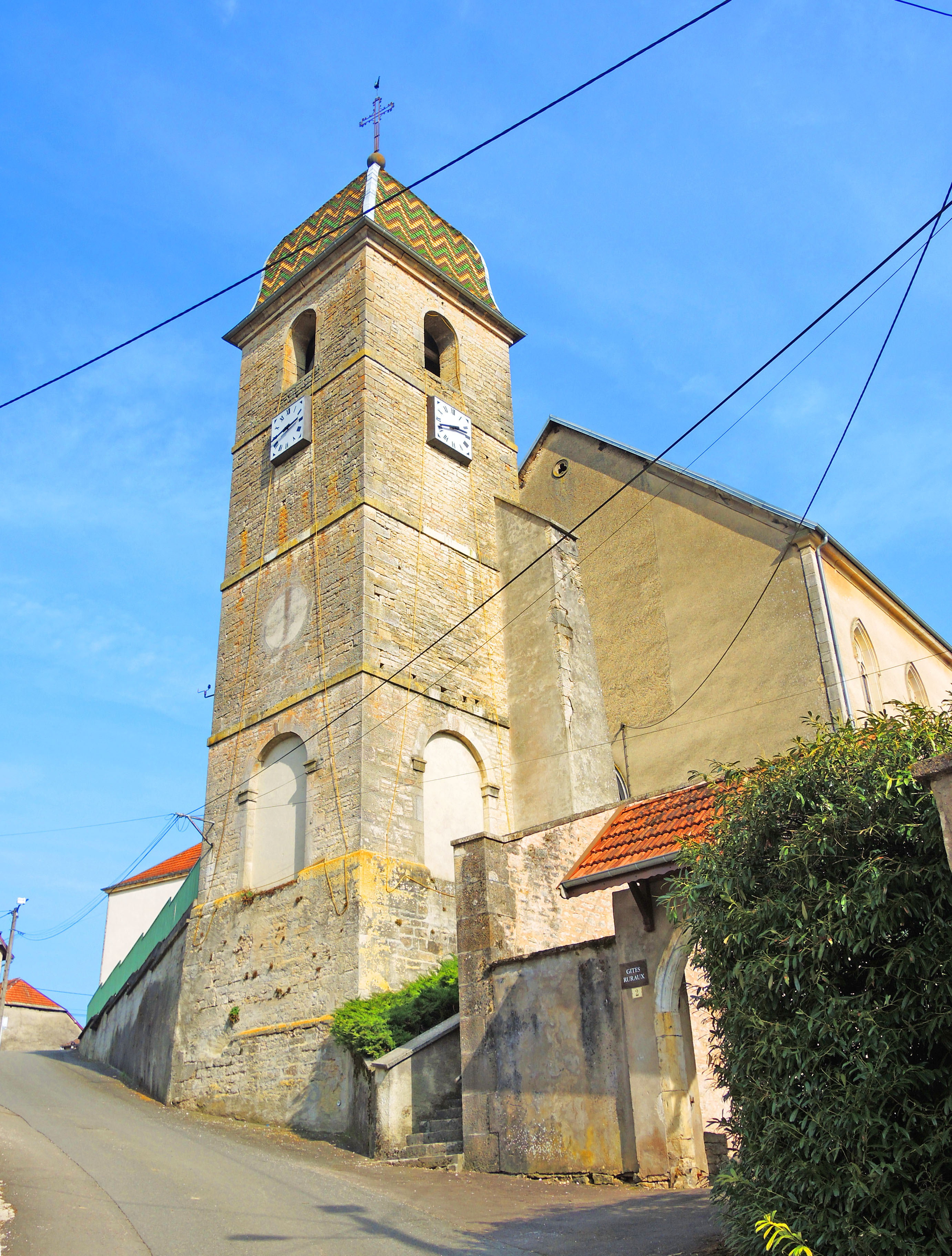 Eglise de Mancenans. Département du doubs.